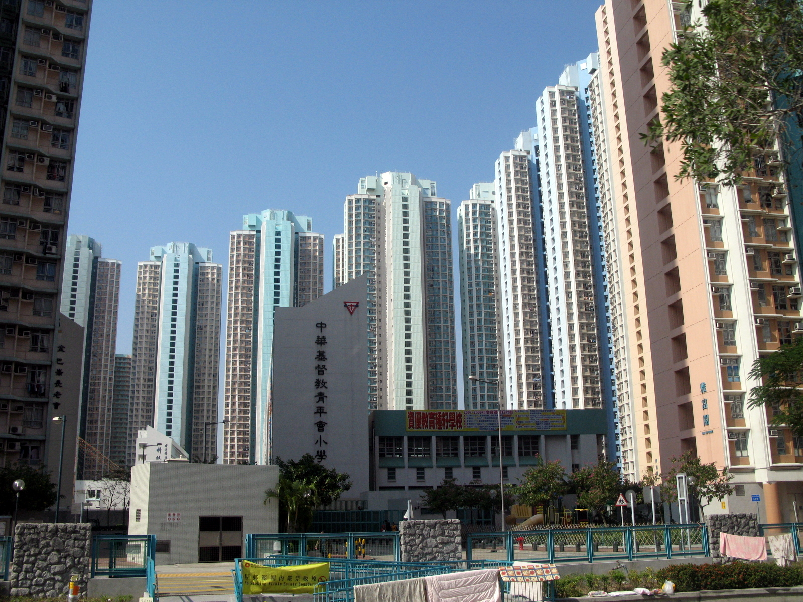 Tin Fu Court